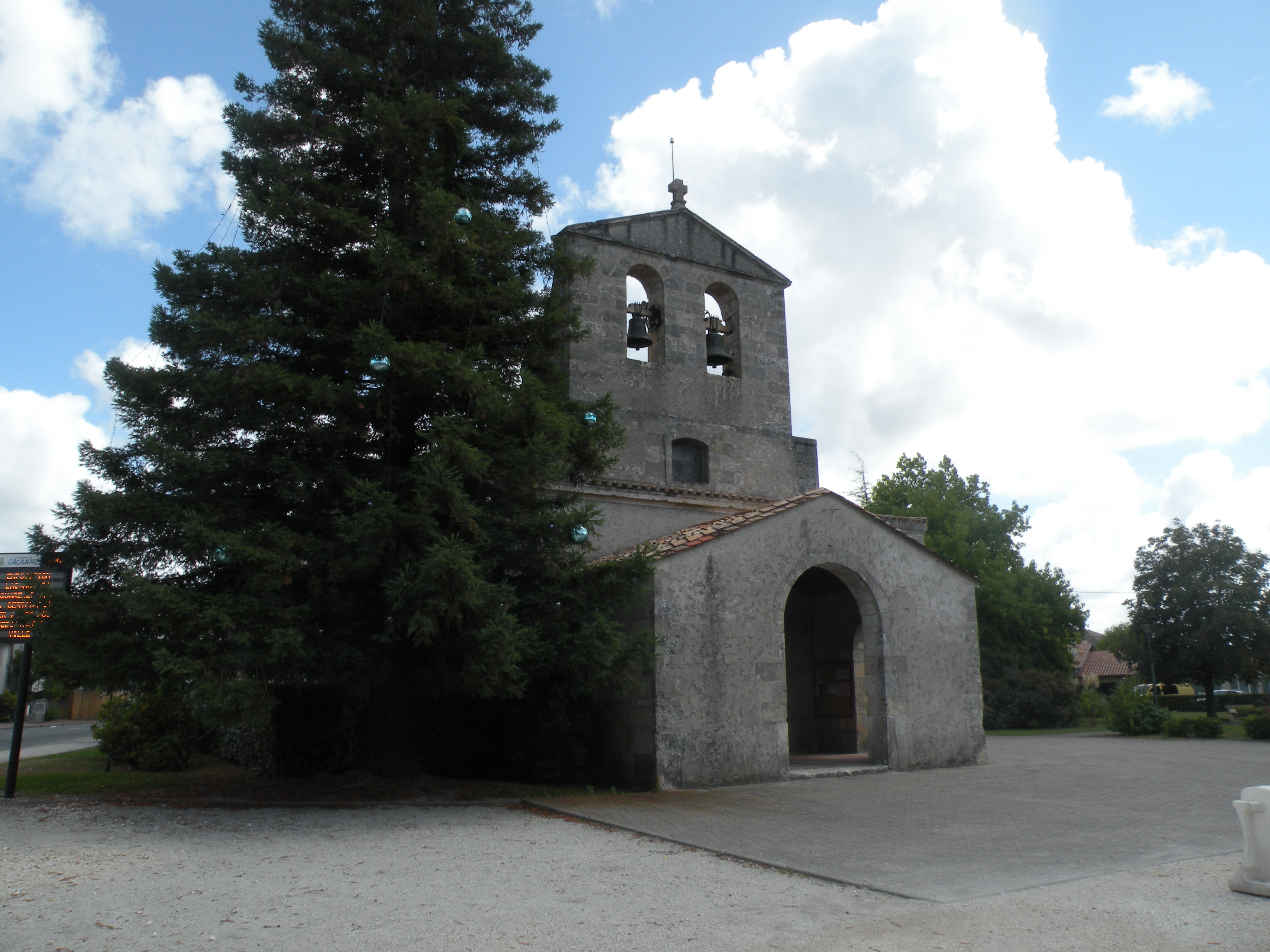 Église Saint-Vincent de Lacanau